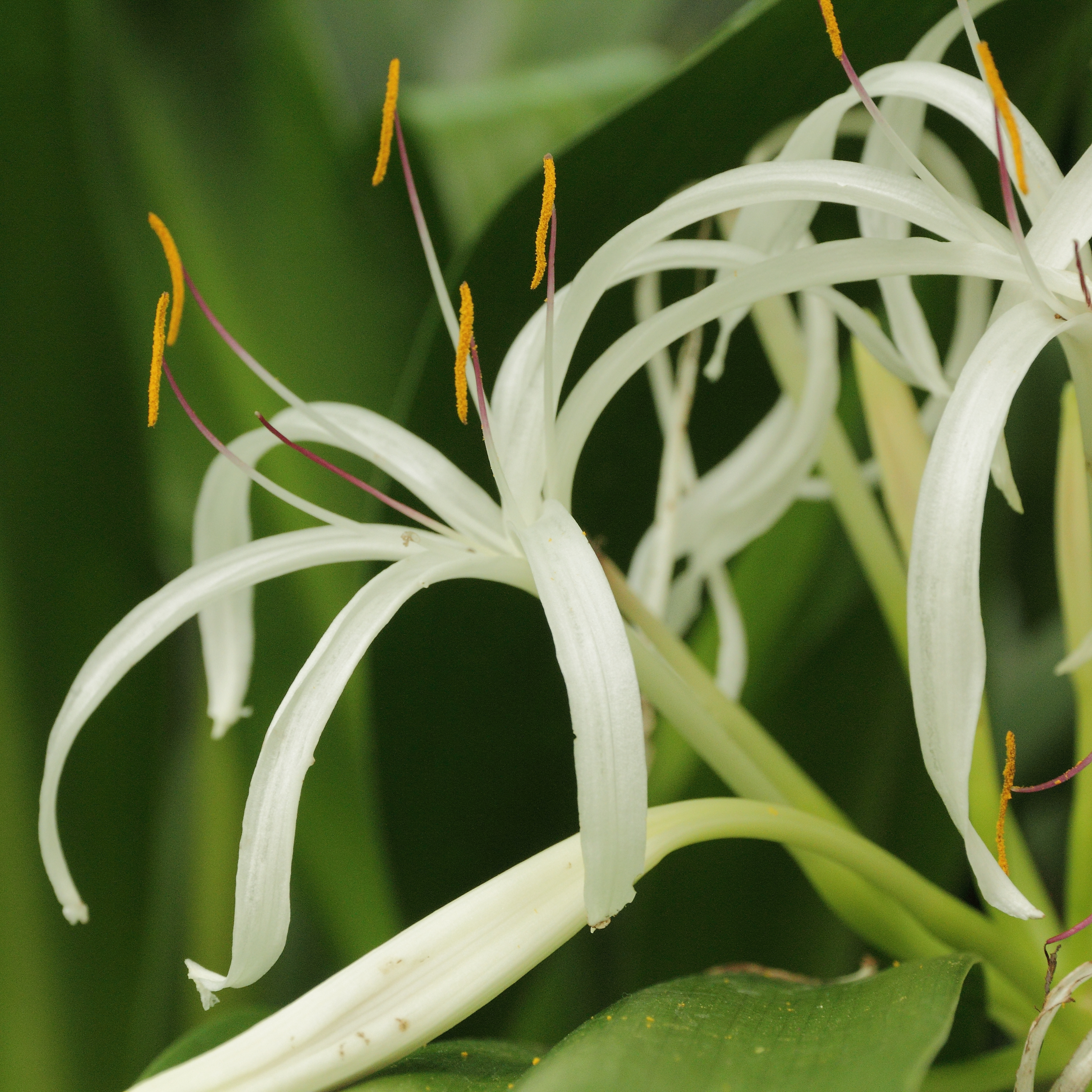 Crinum asiaticum i Bergianska trädgården.